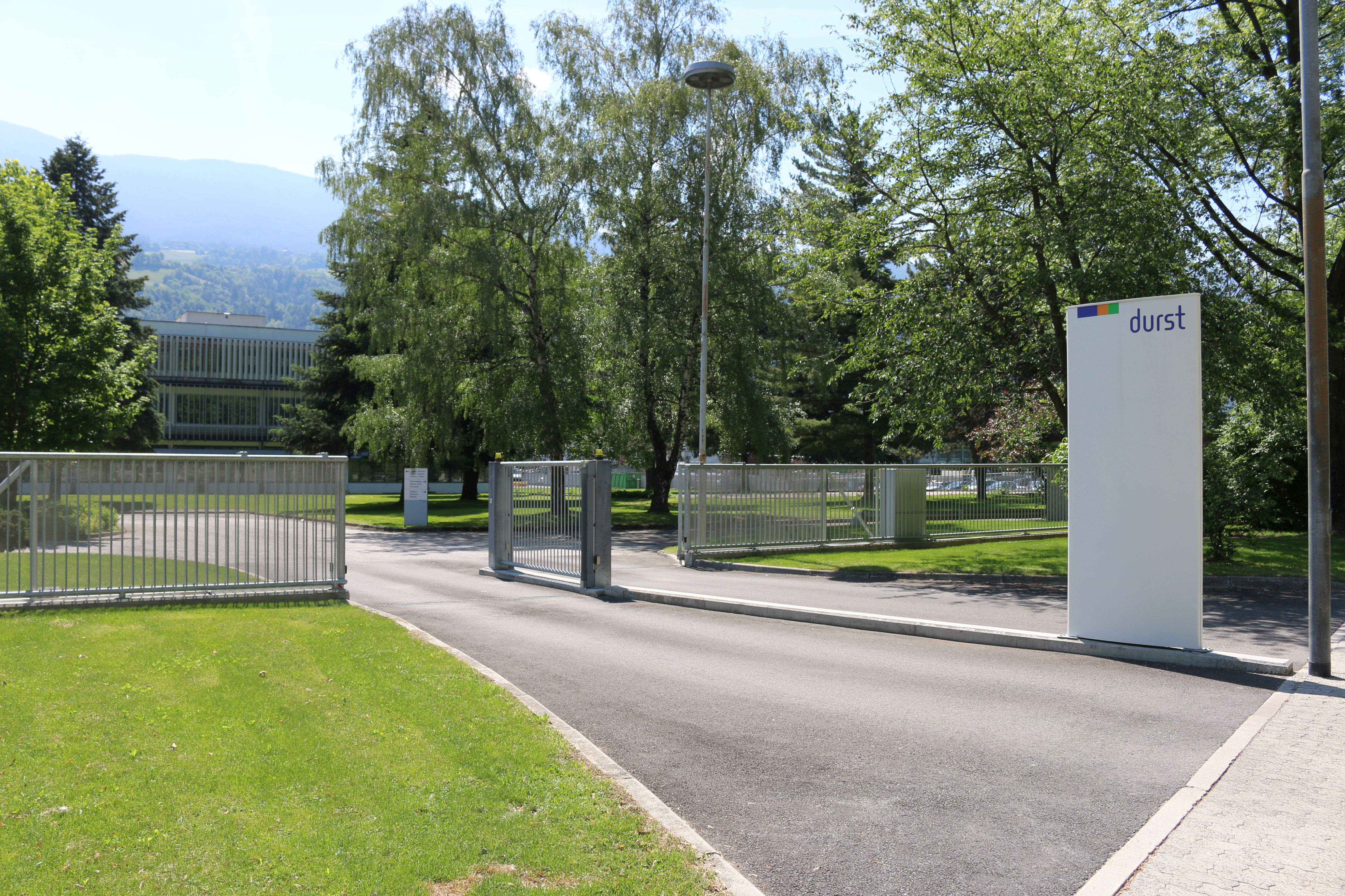 Brixen, Südtirol: Gebäude Durst AG